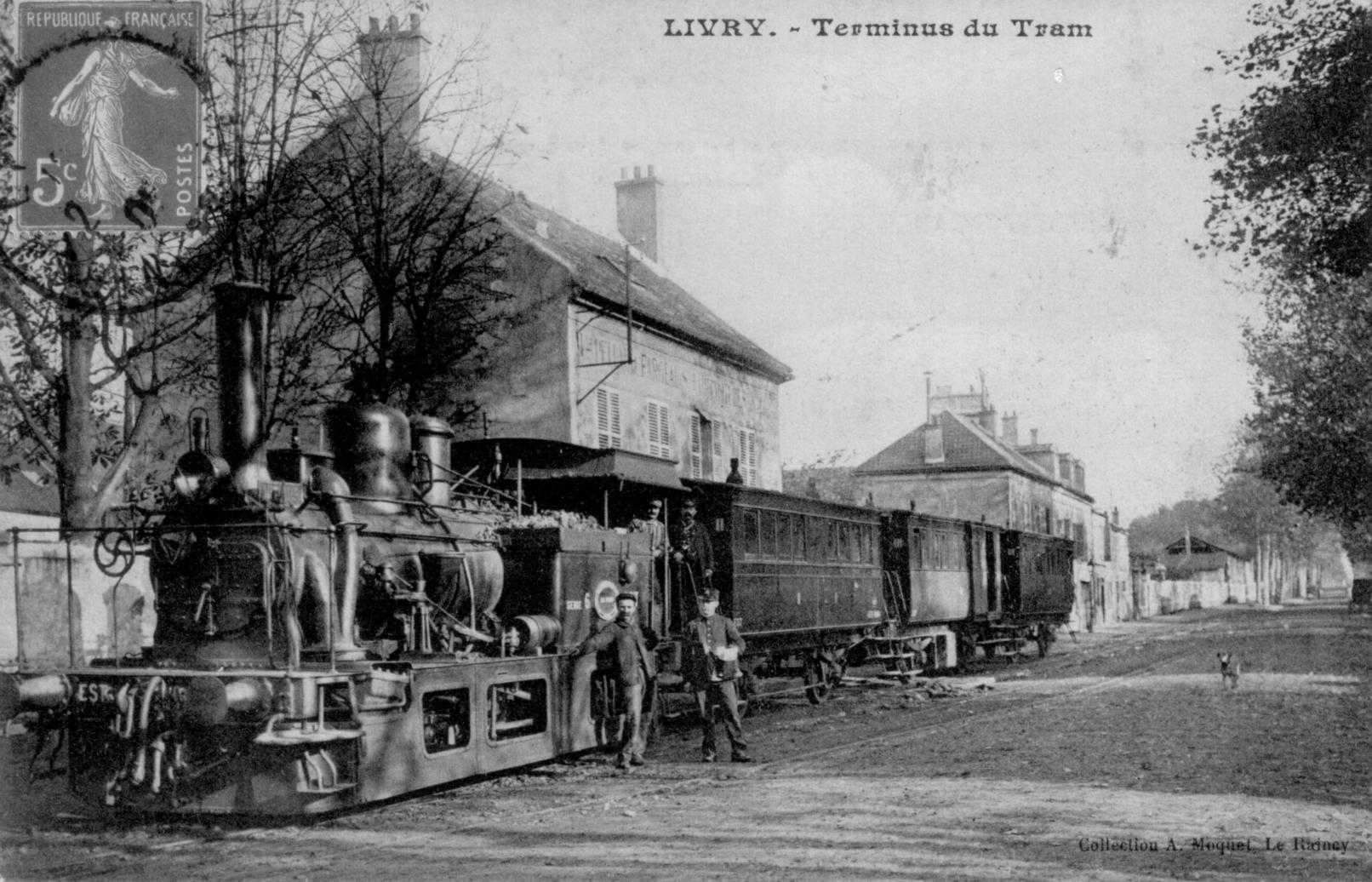 Carte postale ancienne éditée par Moquet tram à vapeur de la ligne de tramway de Livry à Gargan à son terminus de Livry.